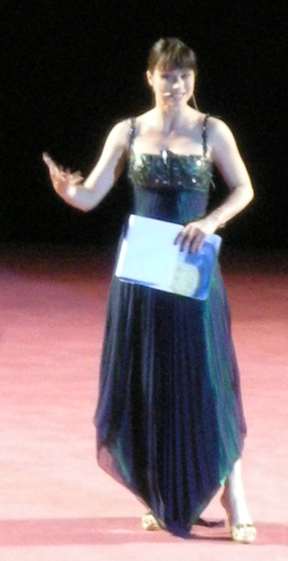 Taormina film festival 2009, lorena bianchetti